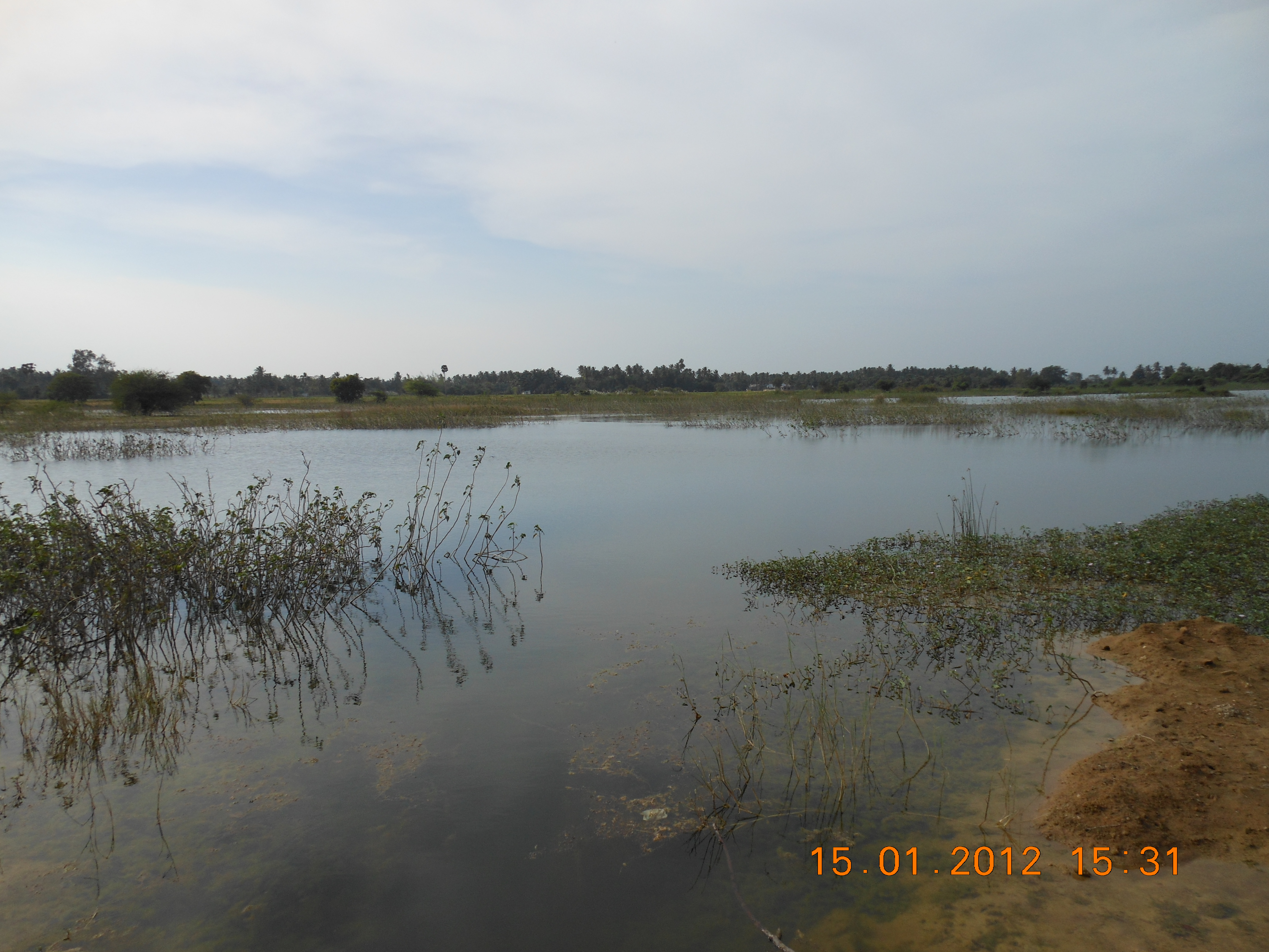 பொன்னன் ஏரி